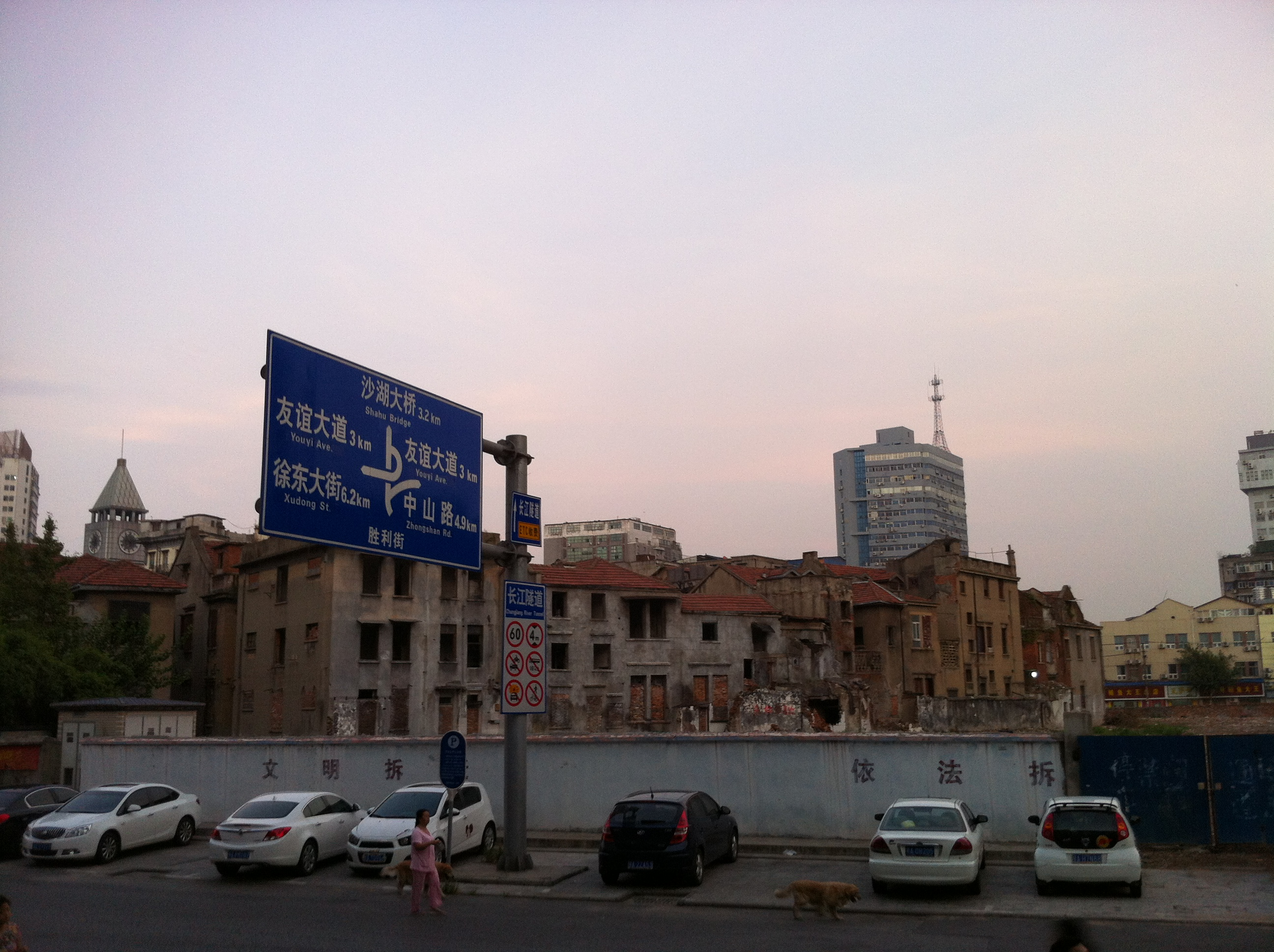 中文（中国大陆）: 咸安坊，武汉里份